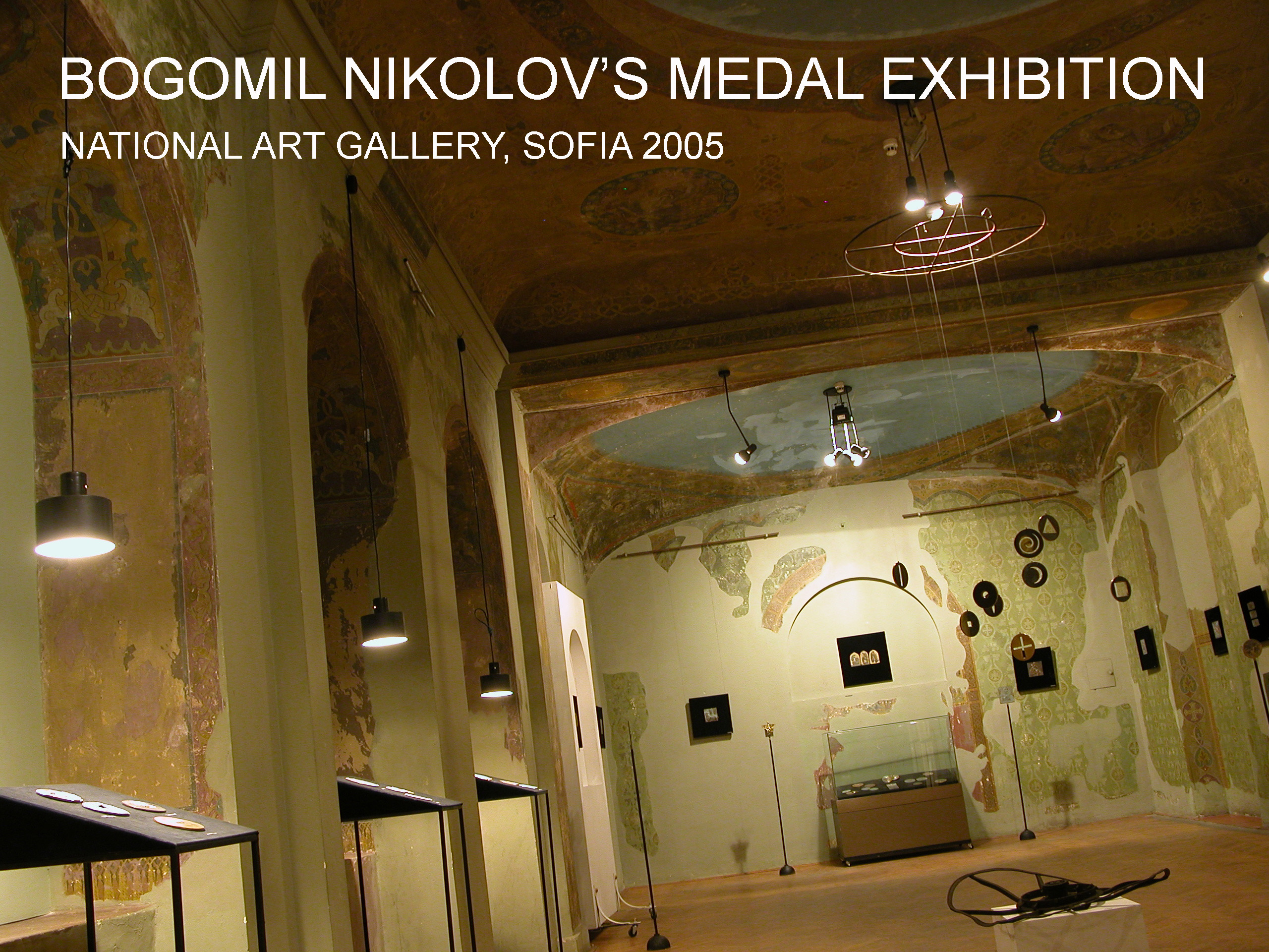 Изложба в Националната галерия 2005 г.